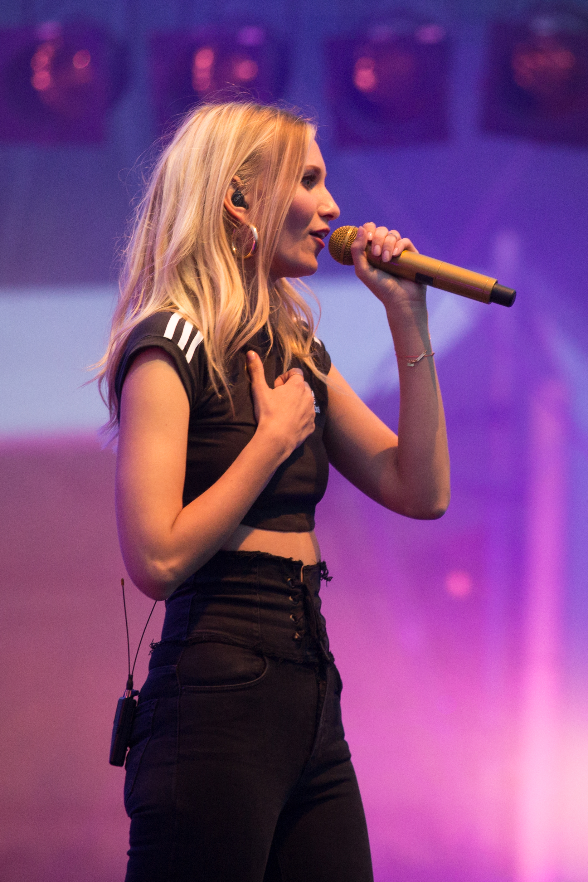 Carolin Niemczyk von Glasperlenspiel auf dem Internationalen Deutschen Turnfest 2017 in Berlin